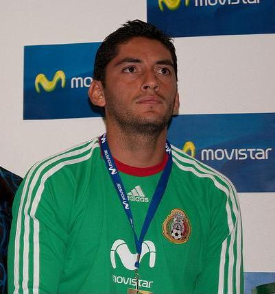 Grandes personalidades que nos visitaron. Foto: @falconantonio Jesus Corona Mexican Footballer